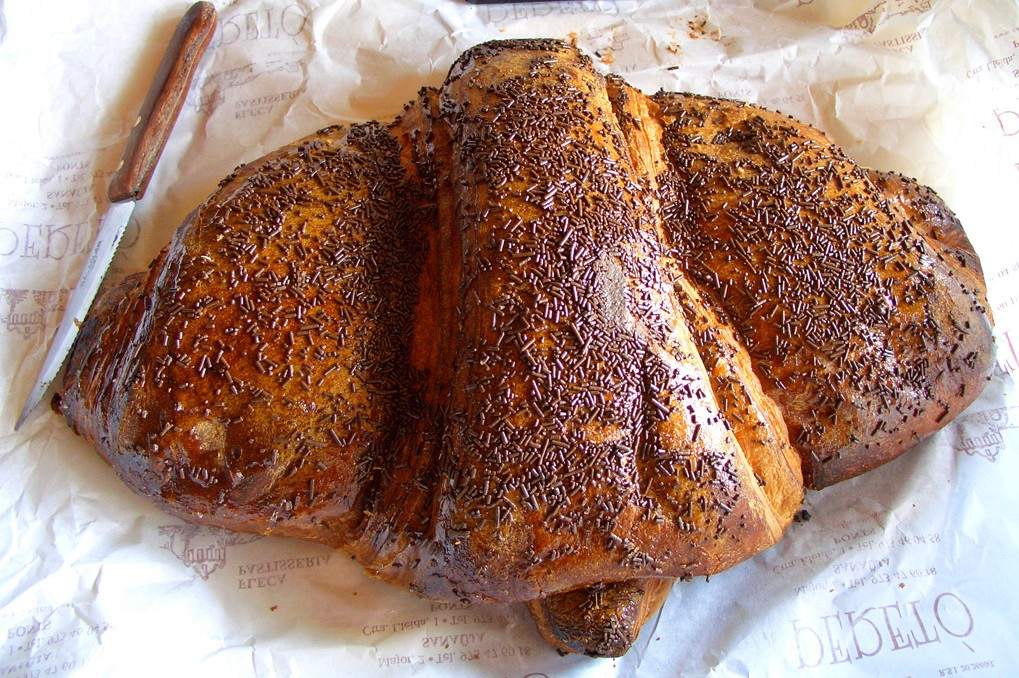 Croissant gegantí típic de la vila de Ponts.